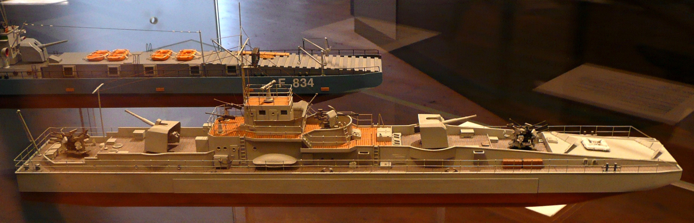 Modell im Maßstab 1:100 eines Artilleriefährprahms Typ D. Ausgestellt im Internationalen Maritimen Museum Hamburg